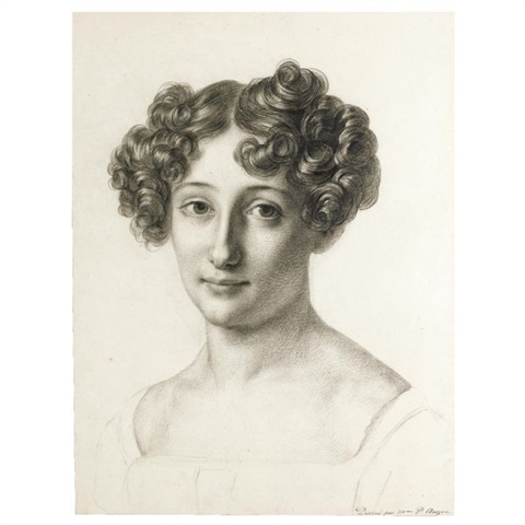 Autoritratto (?)